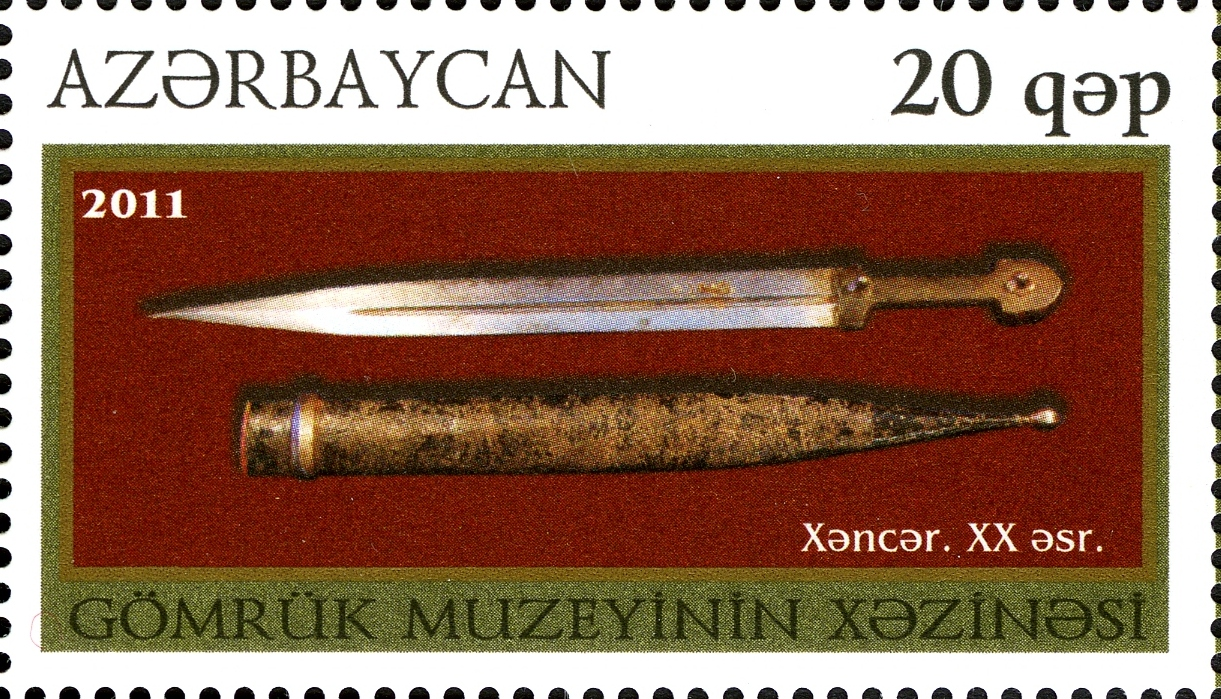 Gömrük Muzeyinin xəzinəsi